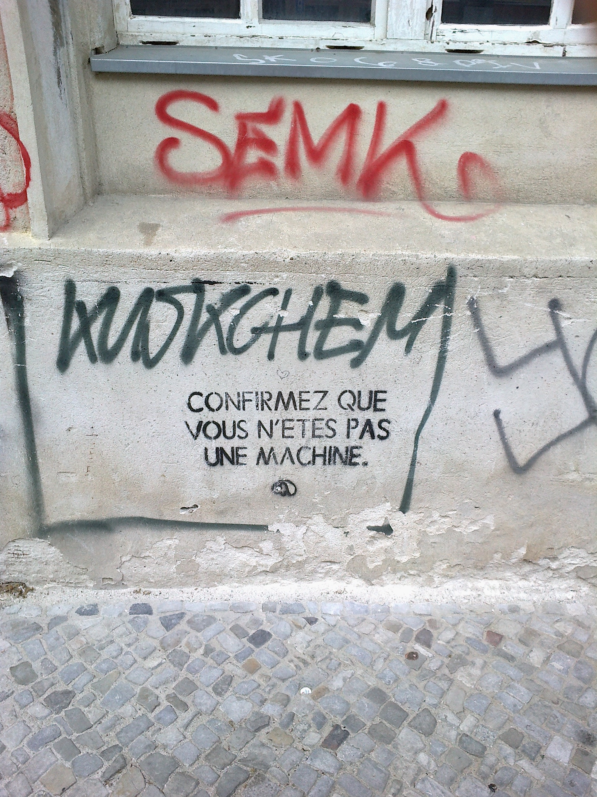 Graffiti anonyme de 2013 "Confirmez que vous n'êtes pas une machine"